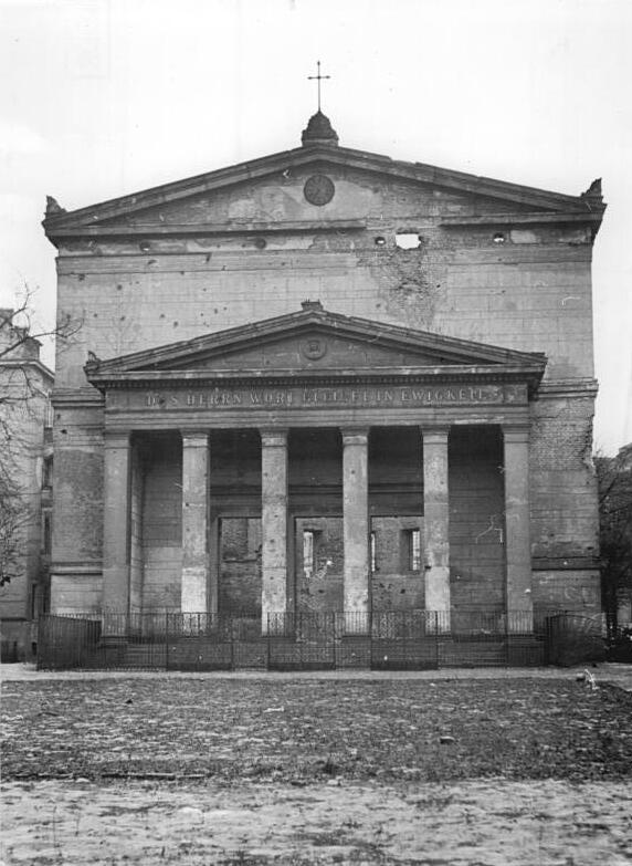 Berlin, Elisabethkirche, Ruine Historische Berliner Kirchen werden wieder aufgebaut. Laut Beschluss des demokratischen Magistrats werden in diesem Jahr an den im demokratischen Sektor unter Denkmalschutz stehenden Kirchen zahlreiche Reparaturarbeiten vorgenommen. Die St. Hedwigs-Kathedrale soll eine neue Kuppel erhalten, auch die Elisabeth-Kirche wird restauriert werden. An der Parochial-Kirche wird bereits gearbeitet und die Arbeiten die die Friedrich-Werdersche-Kirche vor dem Verfall schützen sollen, sind bereits abgeschlossen. # Nr. 955 [Berlin.- Ruine der Kirche St. Elisabethkirche]